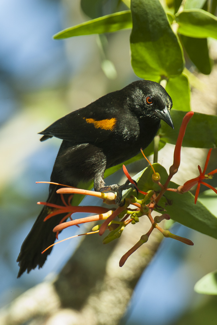 Epaulet Oriole - Pantanal - Brazil_H8O1352